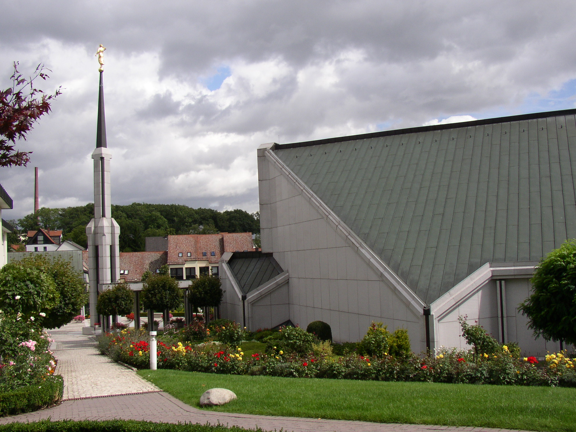 Frankfurt Tempel in Friedrichsdorf aufgenommen aus Richtung Villa